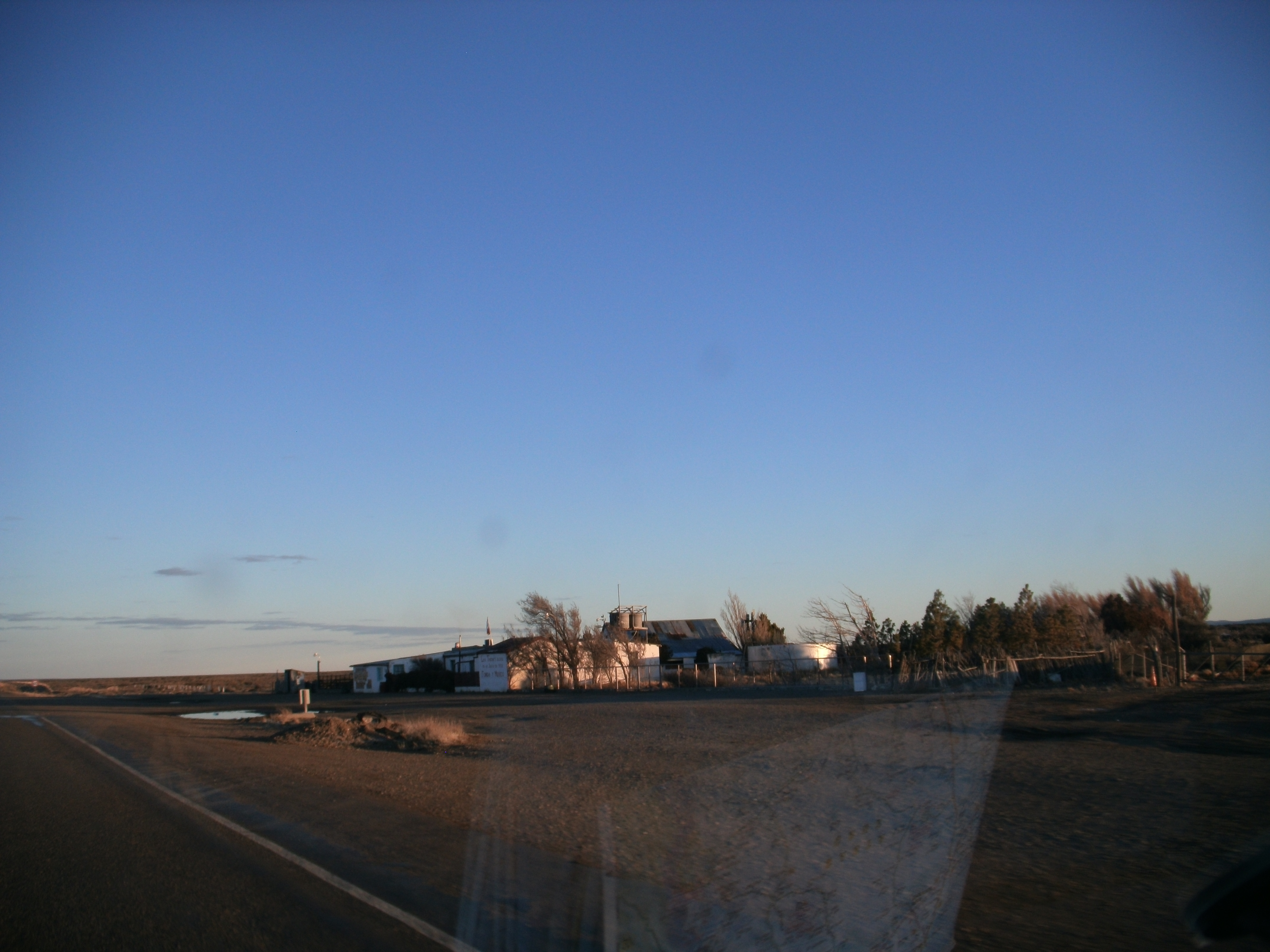 La localidad frente a la ruta